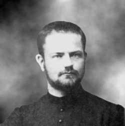 foto storica e originale che rappresenta Adolphe Roulland fratello spirituale di Teresa di Lisieux